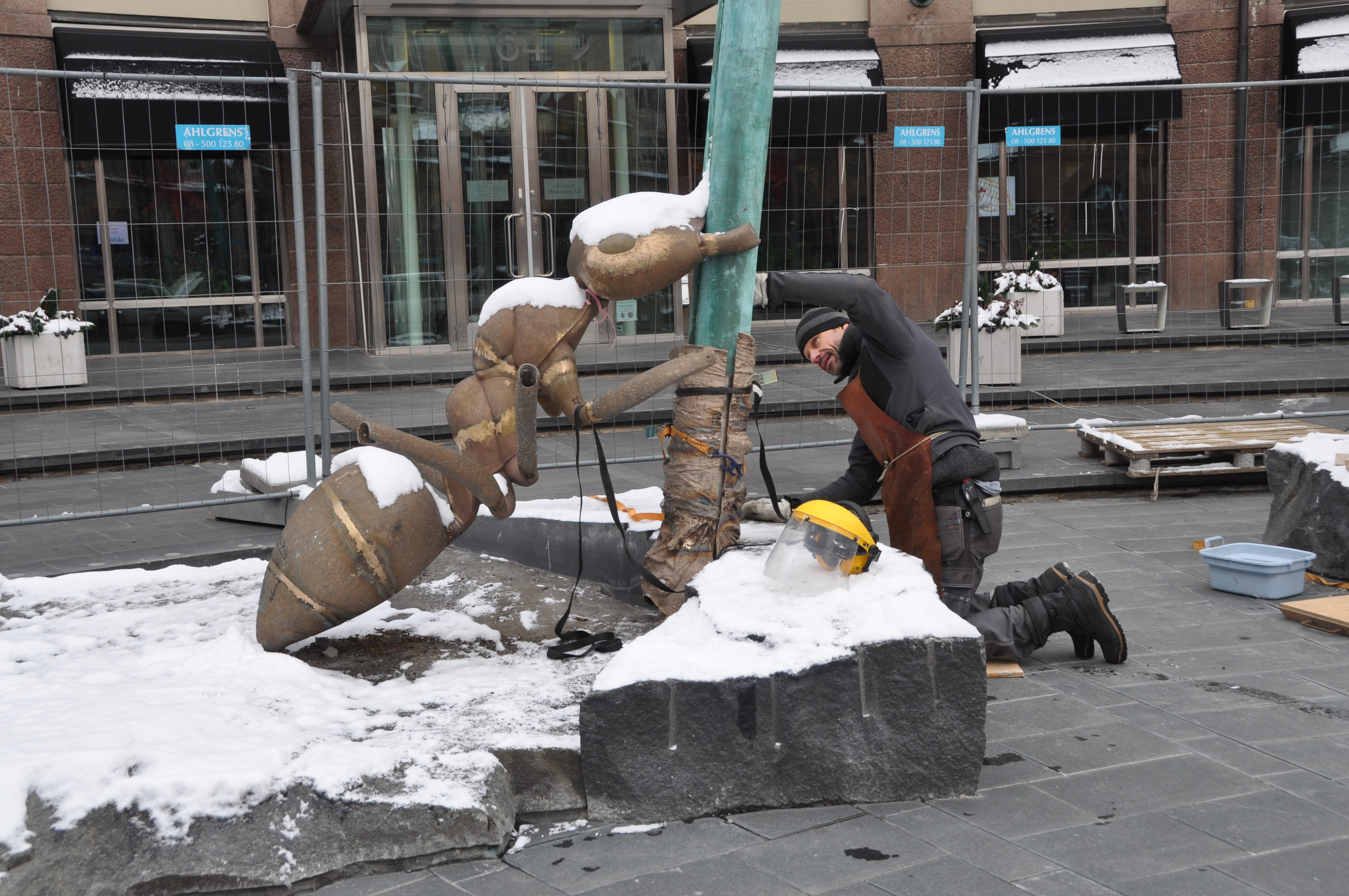 Torgny Larsson arbetar på skulpturen Två Myror utanför Wallenstams kontor